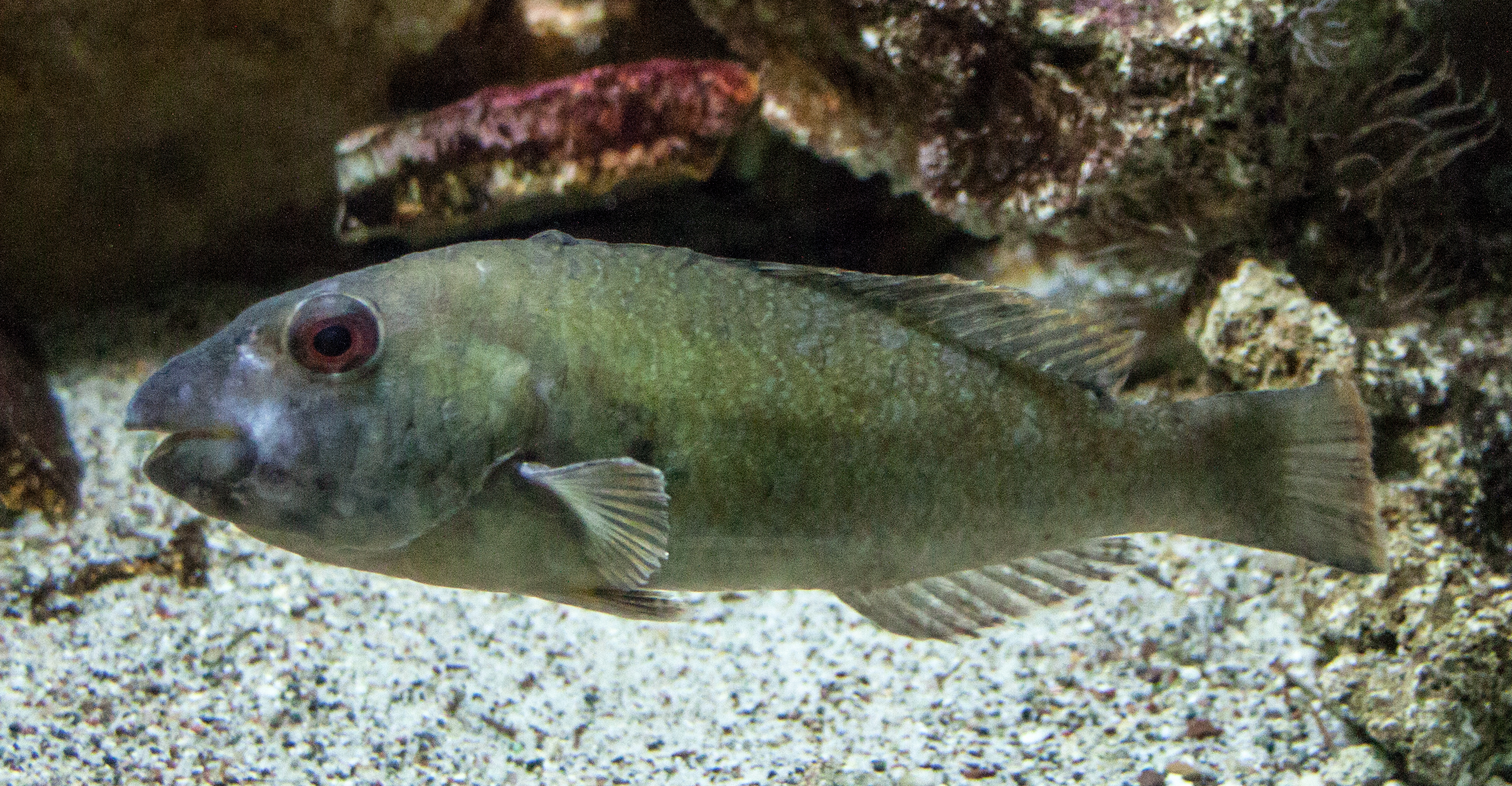 Sparisoma cretense in Rhodes Aquarium